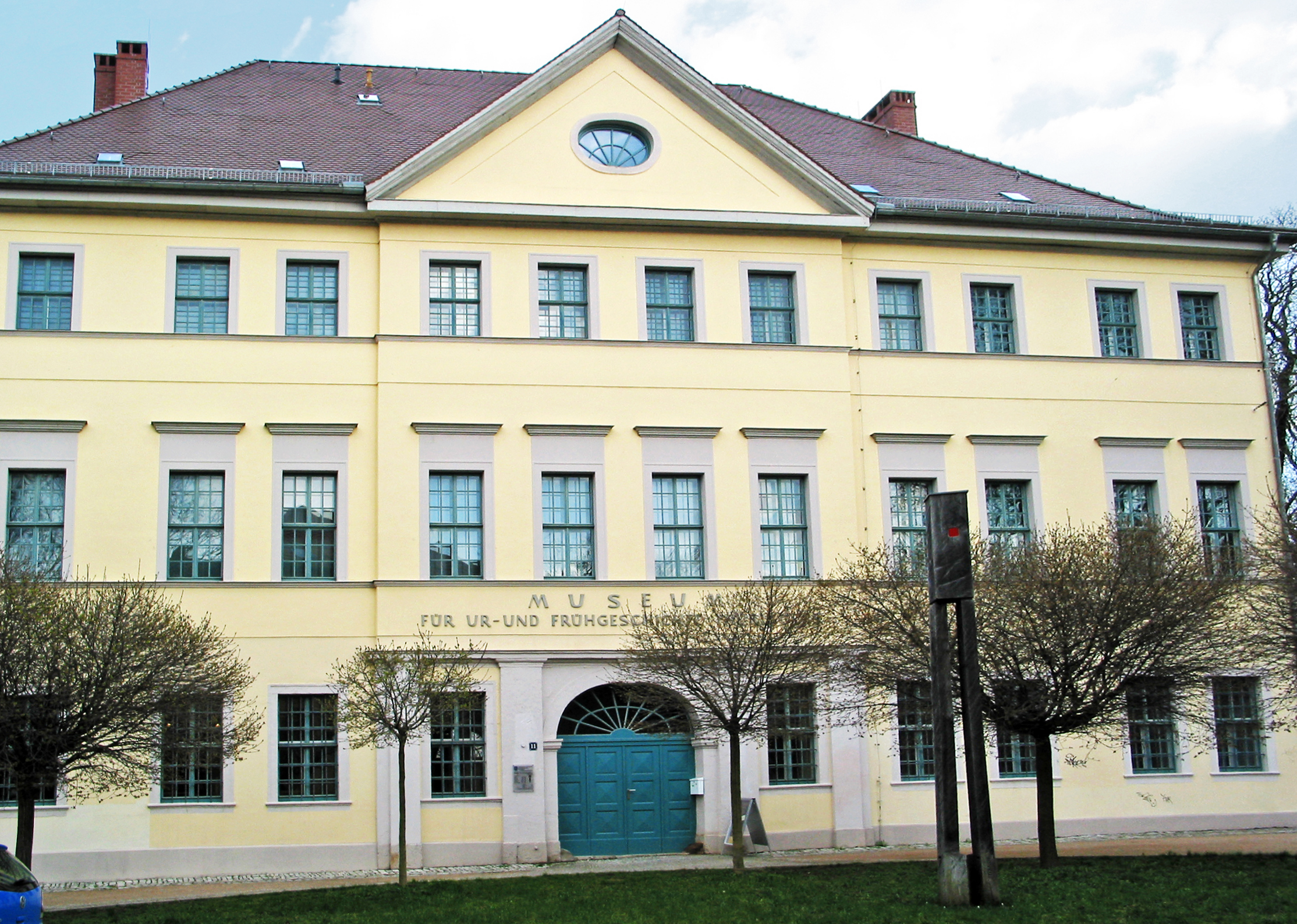 Westansicht des Museums für Ur- und Frühgeschichte Thüringens in Weimar.